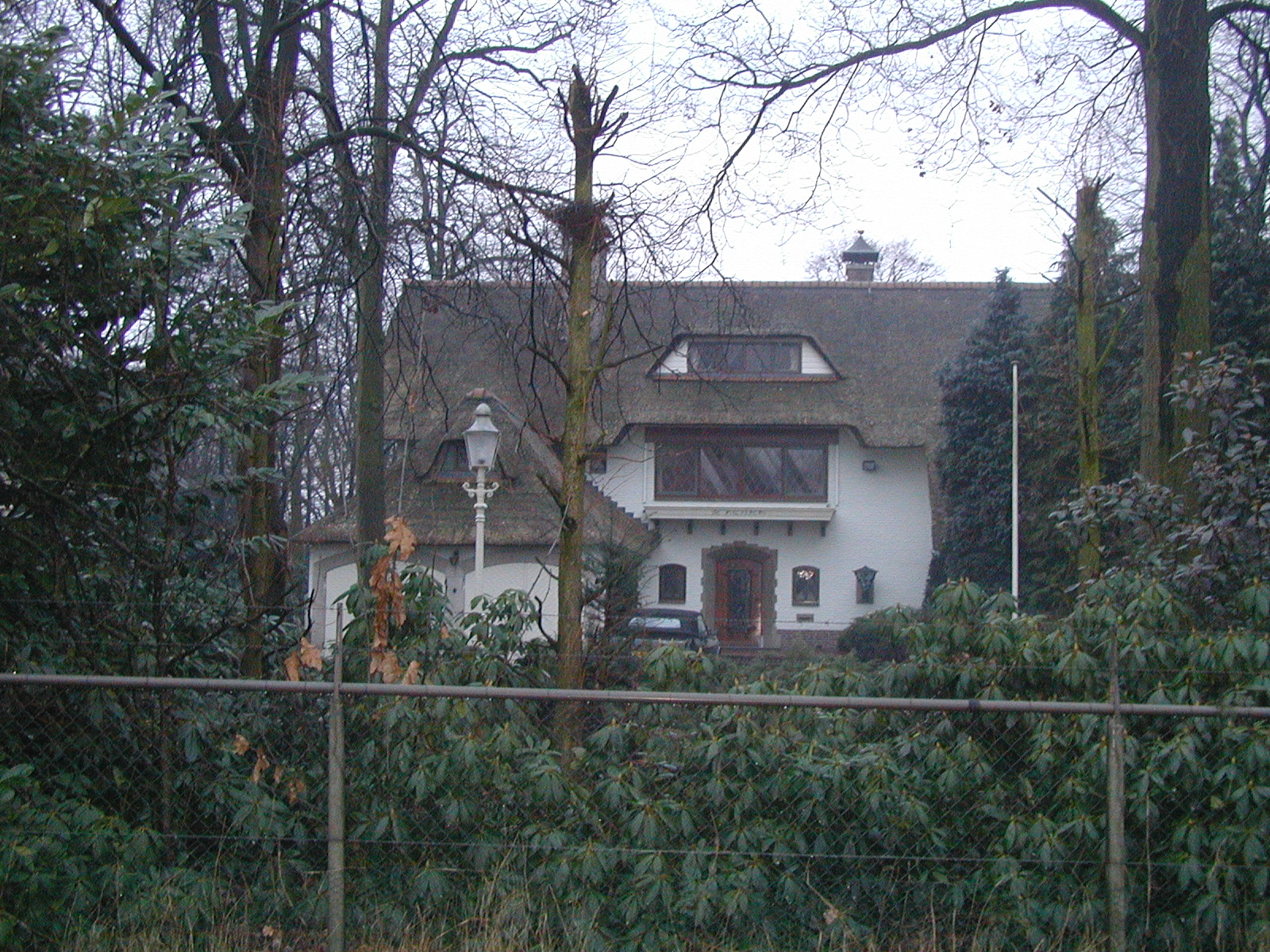 Landhuis Wolfsberg in het voormalige kasteelpark te Deurne (NL)